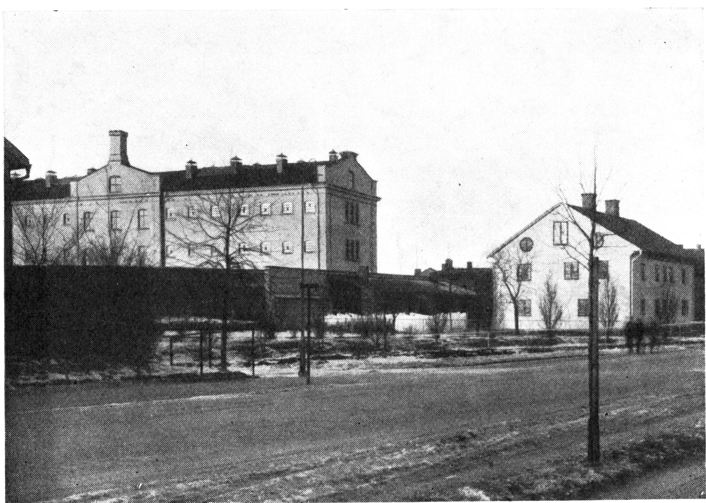 Länsfängelset i Vänersborg